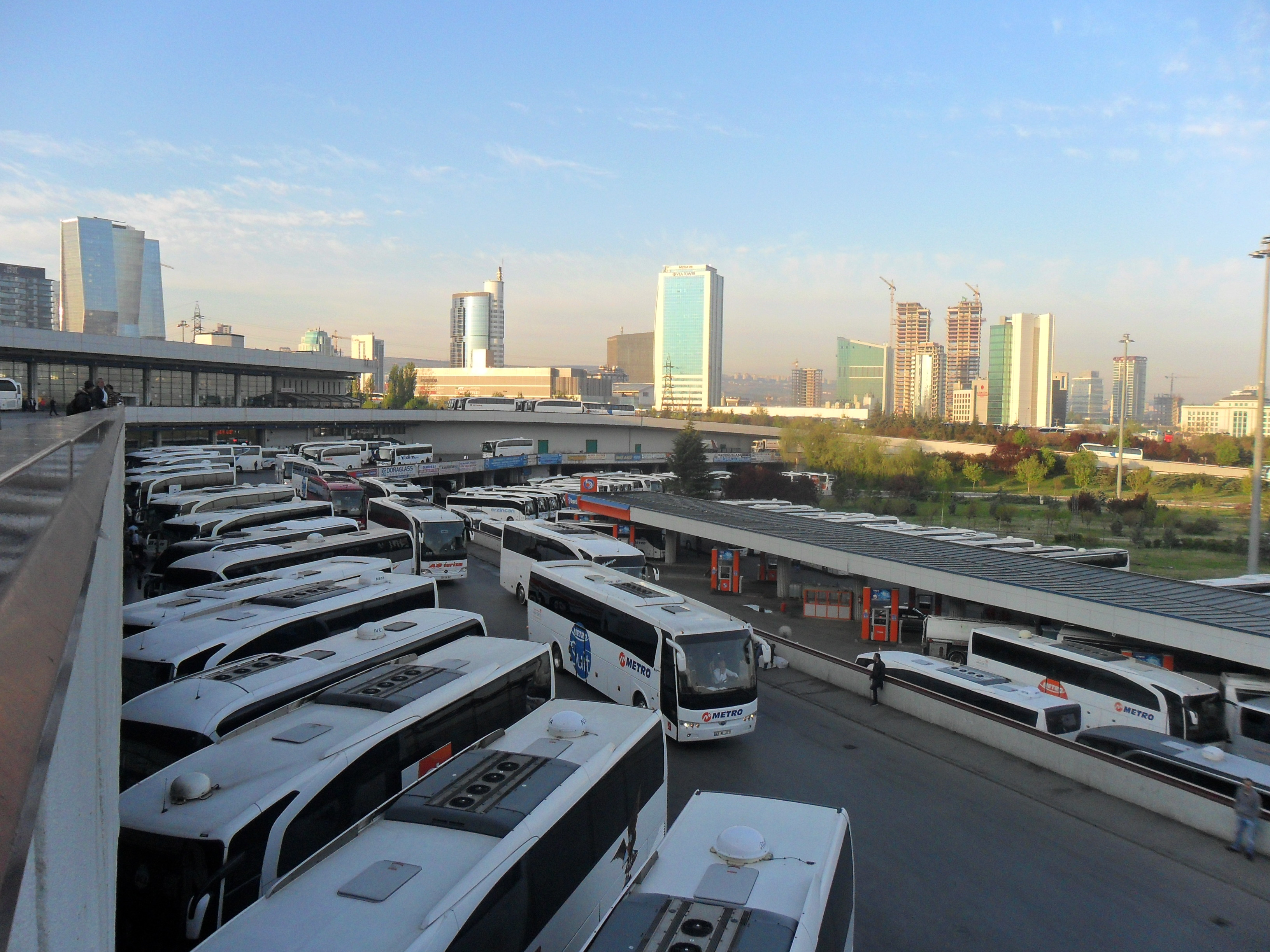 AŞTİ'nin en üst kattan çekilen bir fotoğrafı.